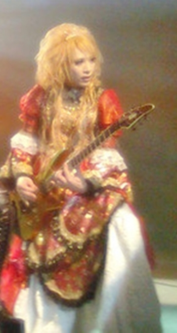 Hizaki, guitarrista de la banda Versailles.